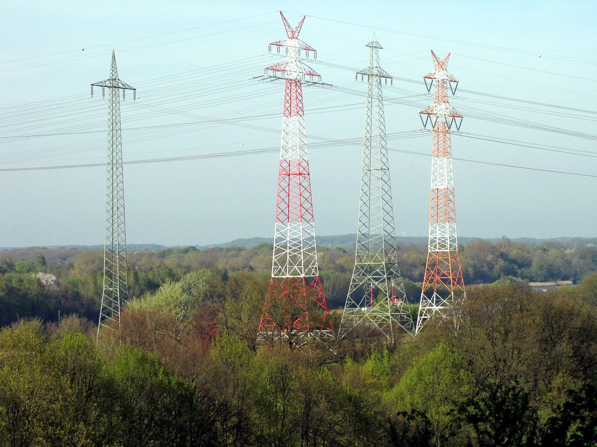 Hochspannungsmasten am Nord-Ostseekanal östlich der Rader Hochbrücke bei Rendsburg